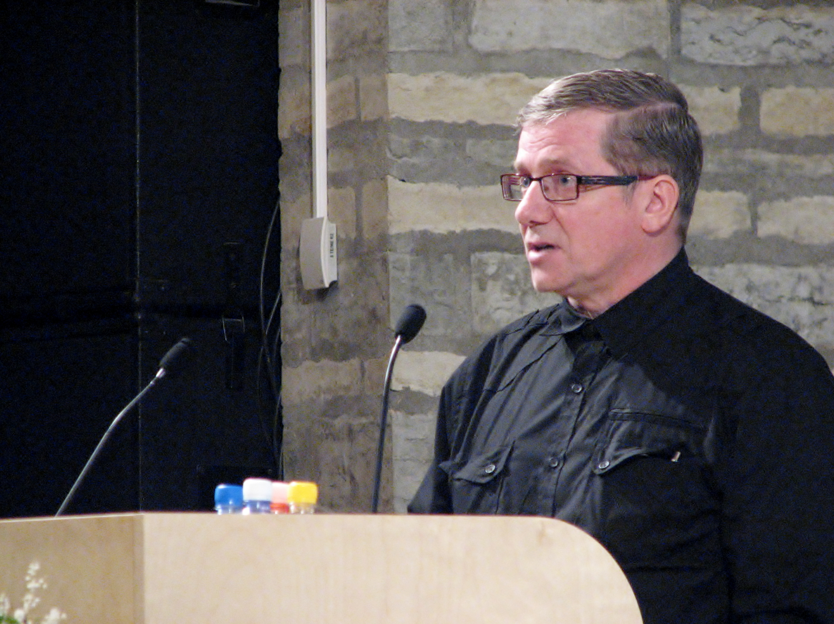 Ahto Oja esinemas Maaema messil Eesti Rahvusraamatukogus